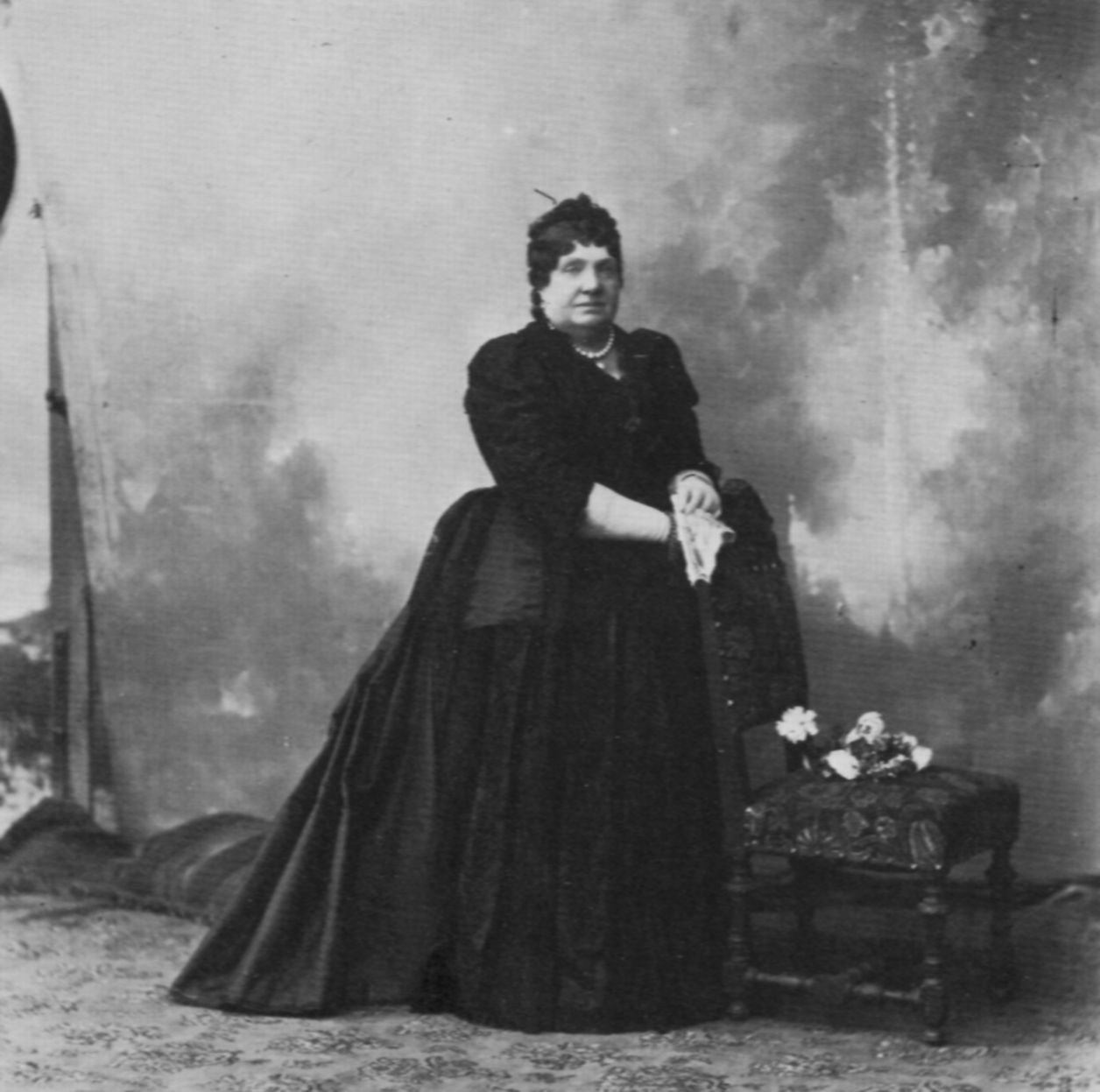 Atelier Nadar: Isabella II. (1830-1904), Königin von Spanien 1833-1868